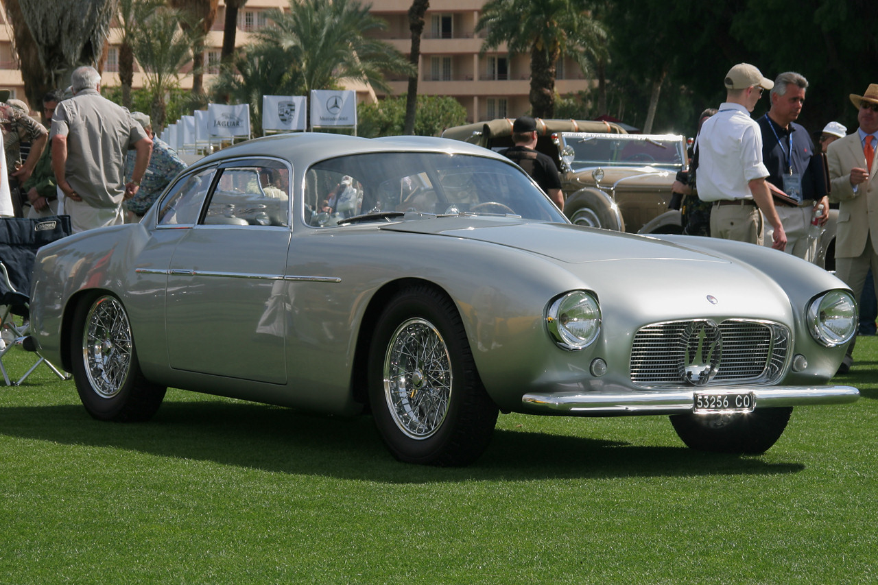 1956 Maserati A6G 54 Berlinetta Zagato Coupe